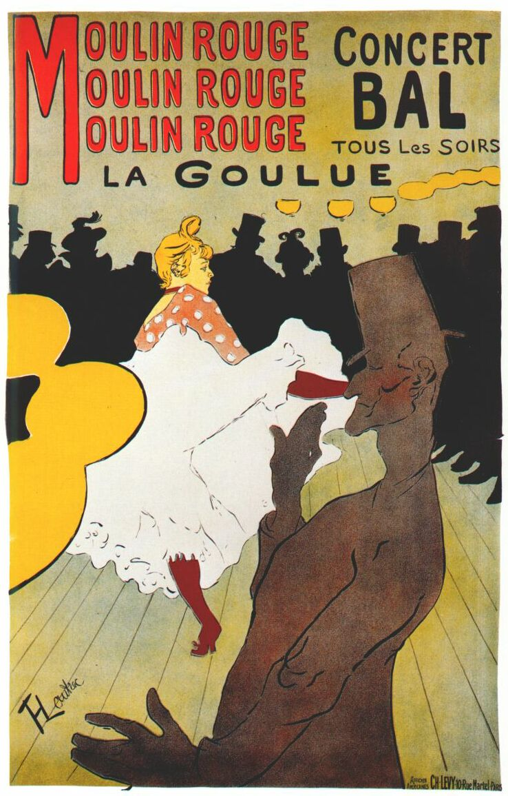 Moulin-Rouge-Plakat von Henri de Toulouse-Lautrec